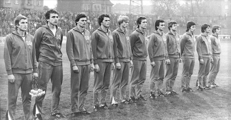 ADN-ZB-Mittelstädt-20.10.78-zin-Halle: Fußball-Europameisterschaft. Die DDR-Fußball-Nationalmannschaft bestritt am 4.10.78 ihr erstes Europameisterschafts-Qualifikationsspiel der Gruppe 4 gegen Island und besiegte die Nordländer mit 3:1 (2:1). In dieser Aufstellung begann die DDR-Elf das Spiel: V.l.n.r. Mannschaftskapitän Hans-Jürgen Dörner, Torhüter Jürgen Croy, Lutz Eigendorf, Lothar Hause, Hans-Jürgen Riediger, Gerd Weber, Reinhard Häfner, Konrad Weise, Jürgen Pommerenke, Werner Peter und Martin Hoffmann.